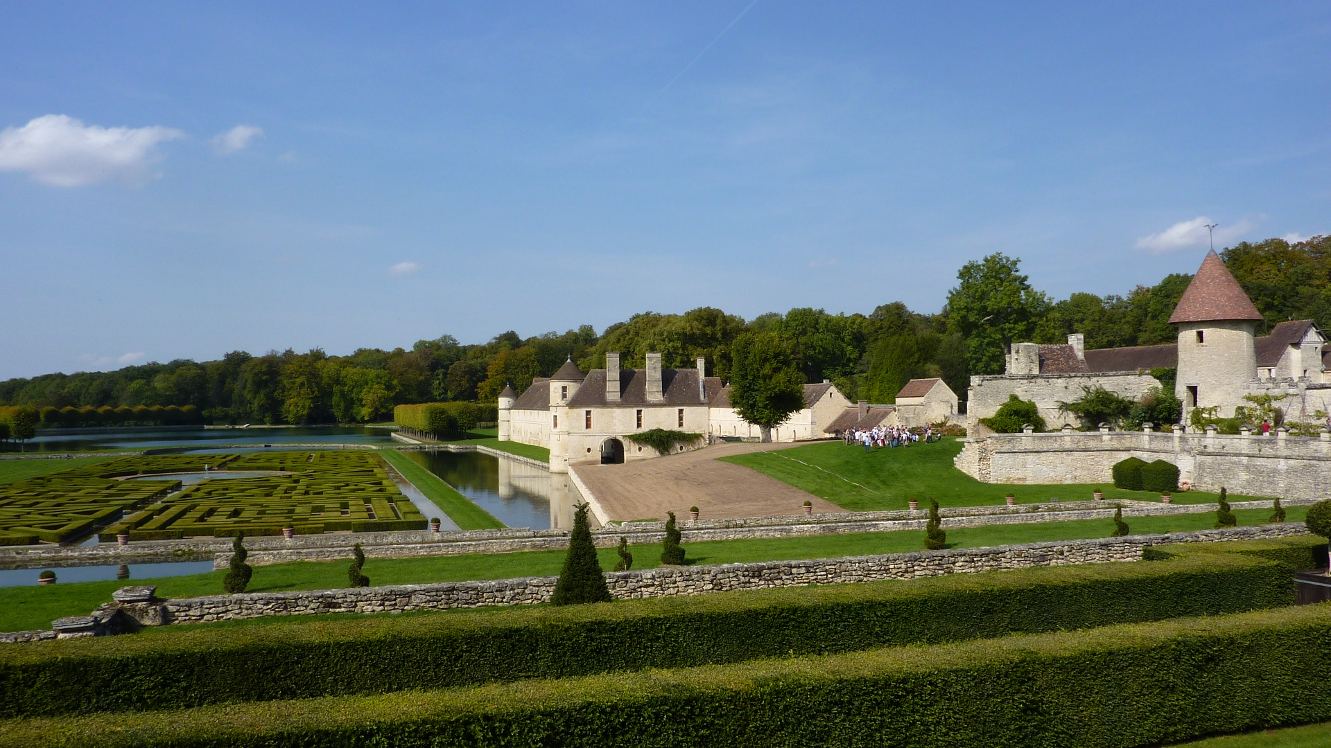 Domaine de Villarceaux - Chaussy (95) Val d'Oise .